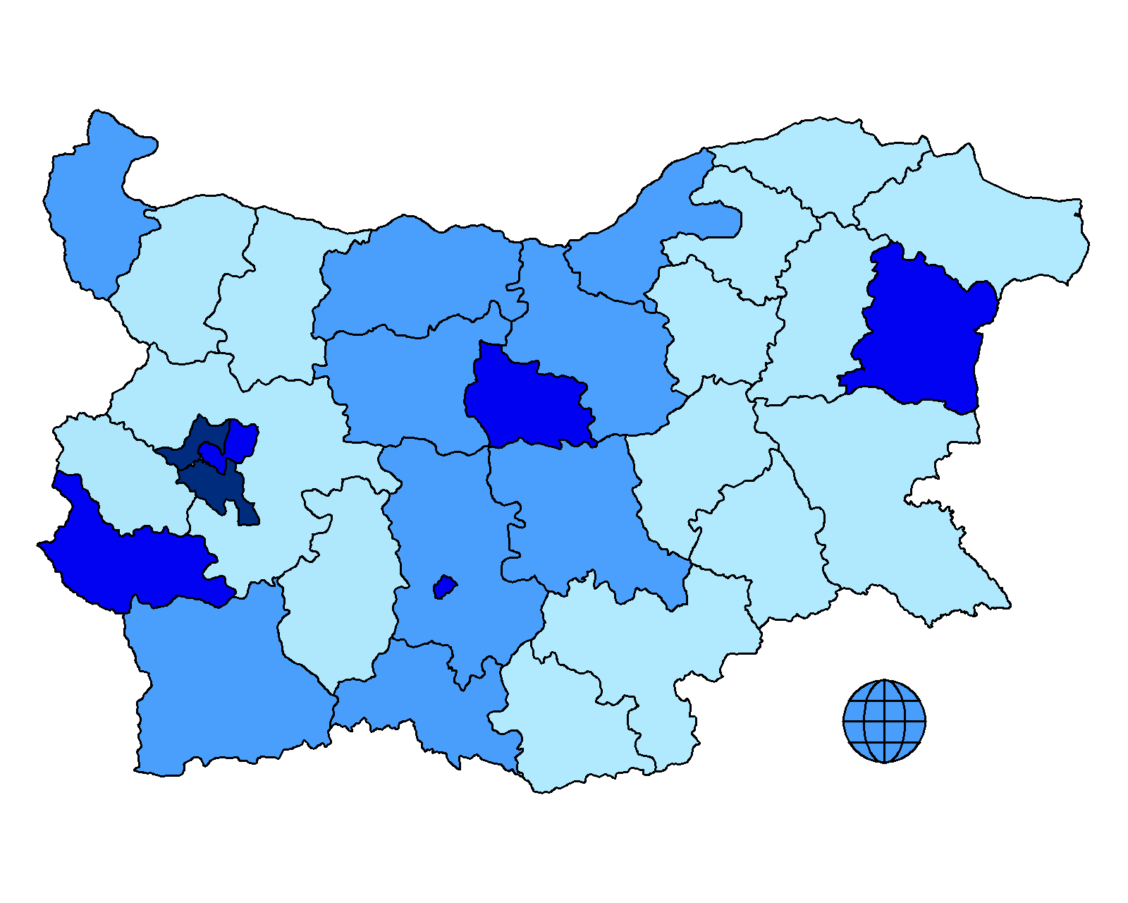 Гласуване по райони за Неделчо Беронов на първия тур на президентските избори през 2006. Всеки от цветовете съответства на приблизително 1/4 от подадените гласове По тъмният цвят съответства на получен по-голям процент от гласовете